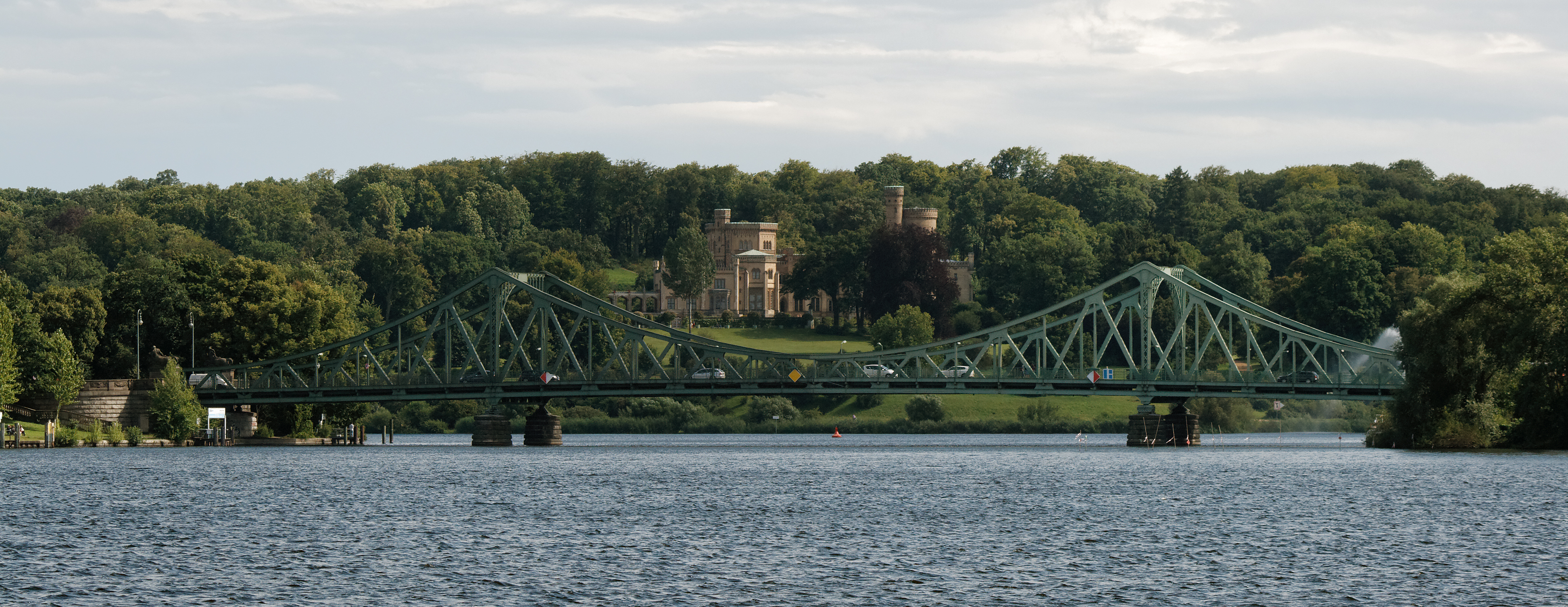 Glienicker Brücke zwischen Berlin und Potsdam mit Schloss Babelsberg.